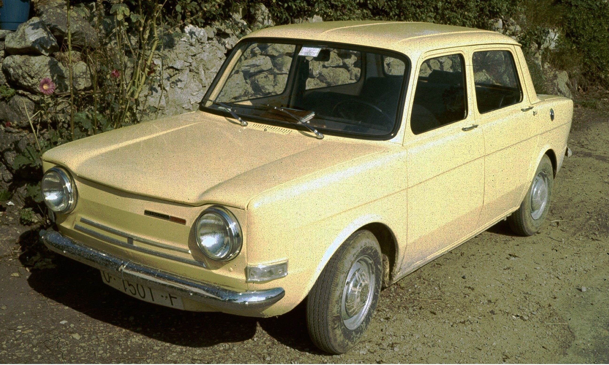 Simca 1000 espagnol